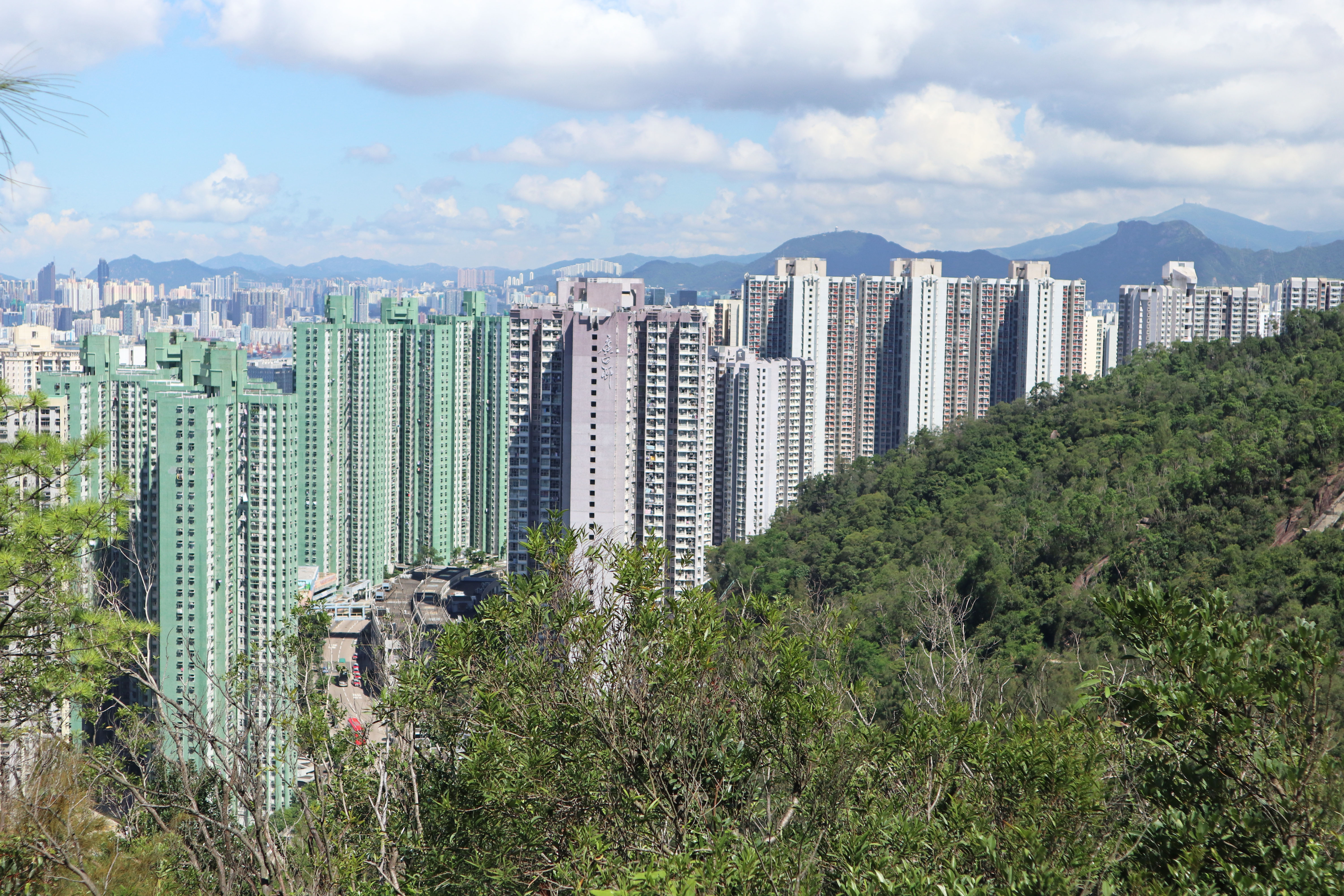 藍田廣田邨及康栢苑外觀